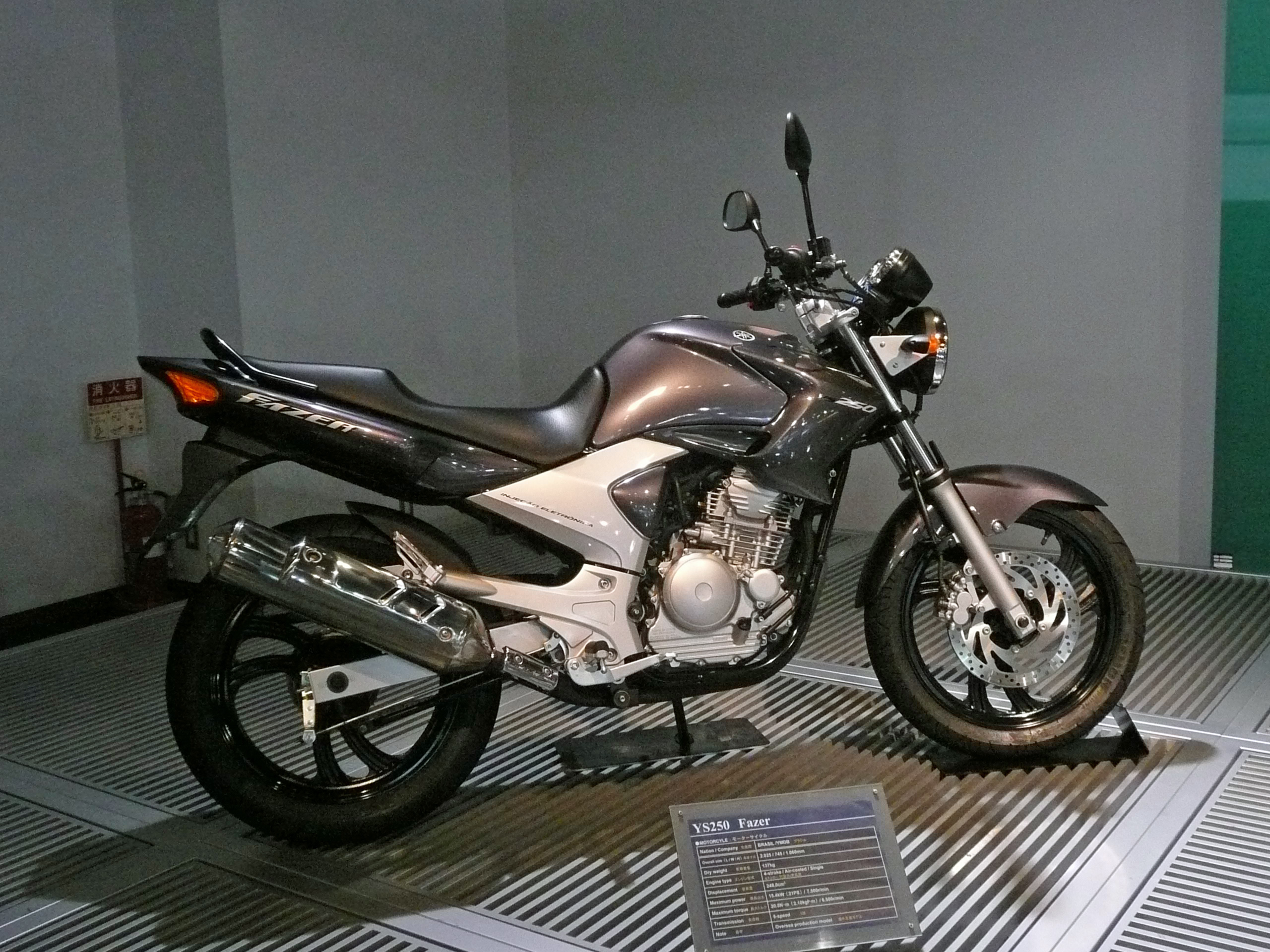 ヤマハ・YS250 Fazer ヤマハコミュニケーションプラザにて撮影